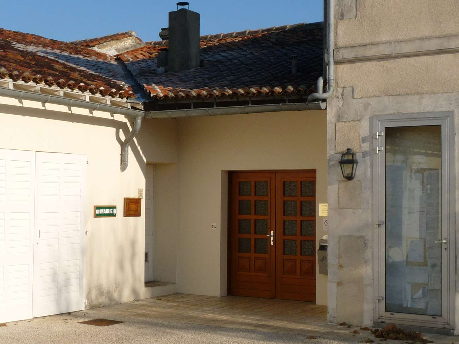 mairie de Gensac-la-Pallue, Charente, France